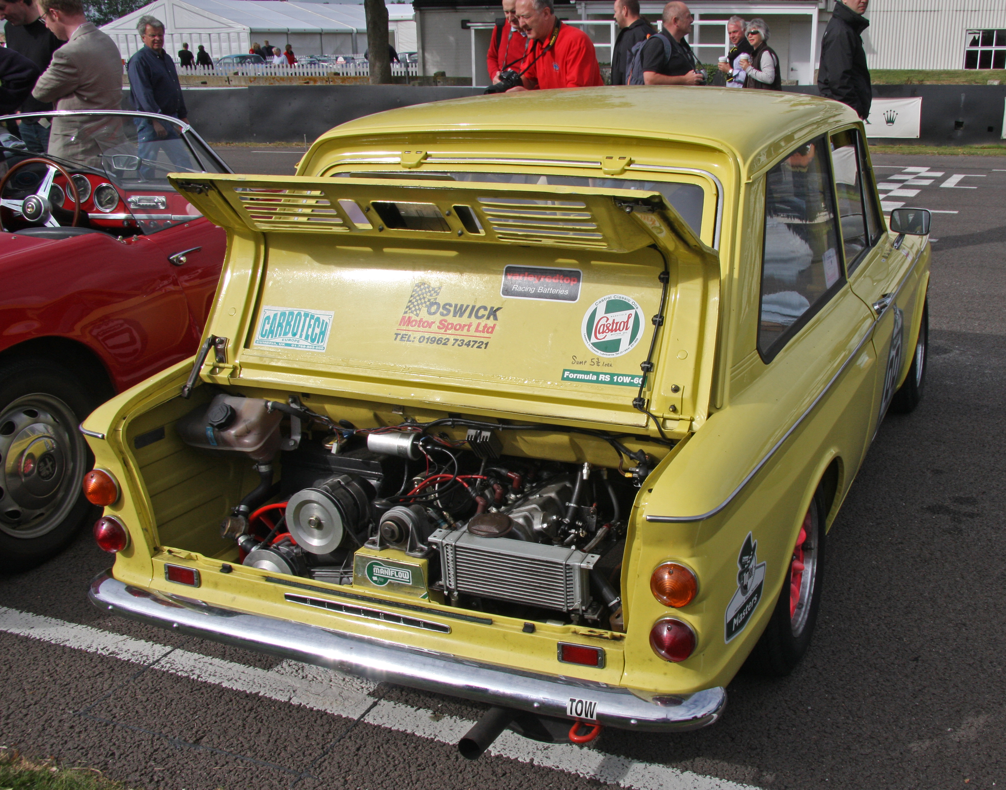 Hillman Imp